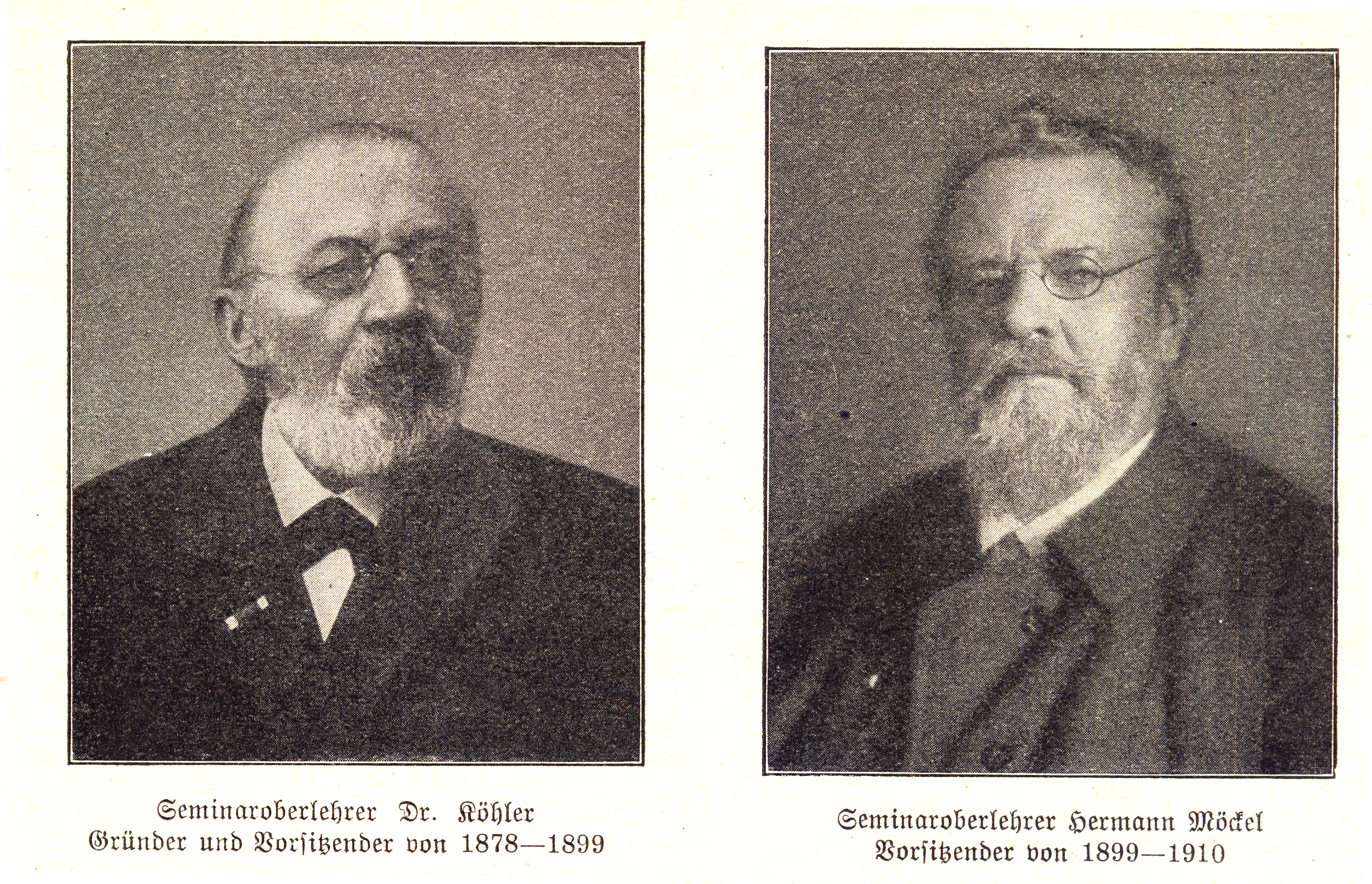 Die ersten Vorsitzenden des Erzgebirgsverein Köhler und Möckel